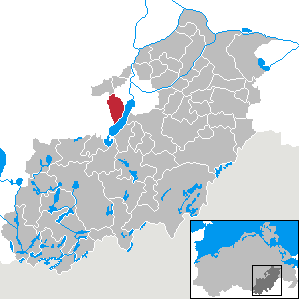 Wulkenzin in Mecklenburg-Vorpommern, Landkreis Mecklenburg-Strelitz